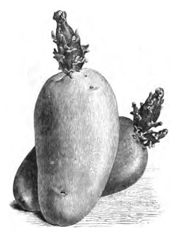 Les plantes potagères. Description et culture des principaux légumes des climats tempérés, 1re édition, ouvrage publié par la maison Vilmorin-Andrieux & Cie à Paris en 1883.